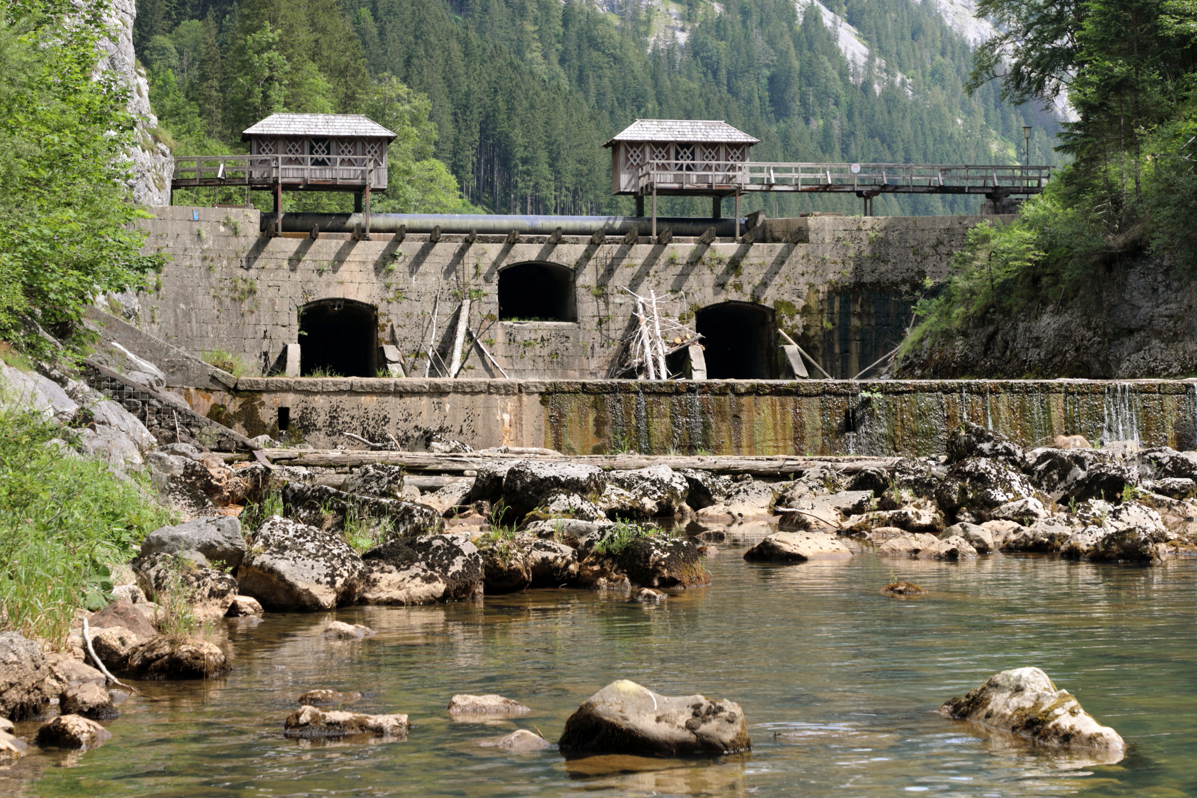 Die Prescenyklause bei Weichselboden in der steiermärkischen Stadtgemeinde Mariazell.Sie befindet sich ca. 1,5 km flussabwärts von Weichselboden an der Salza im Naturpark Eisenwurzen. Die Klause, einst größte Flussklause Österreichs, wurde in den 1840er Jahren unter der Leitung des Forstmeisters Presceny als Stauwerk zwischen zwei mächtigen Felsmassiven errichtet und besteht aus einer 47,5 m langen und bis zu 15 m dicken Staumauer mit drei Durchflussöffnungen. Durch das Öffnen der Klause stand kurzfristig ein rd. einen Meter höheres Triftwasser für die Flößer zur Verfügung. 1969 erwarb die Stadt Wien die Klause und nach der Löschung der Triftrechte im Jahr 1975 wurde die Klause saniert und dient jetzt als Stauwehr für das von 1985 bis 1987 errichtete „Kraftwerk Prescenyklause“. This file shows the Nature Park with the ID 6396 in Austria.